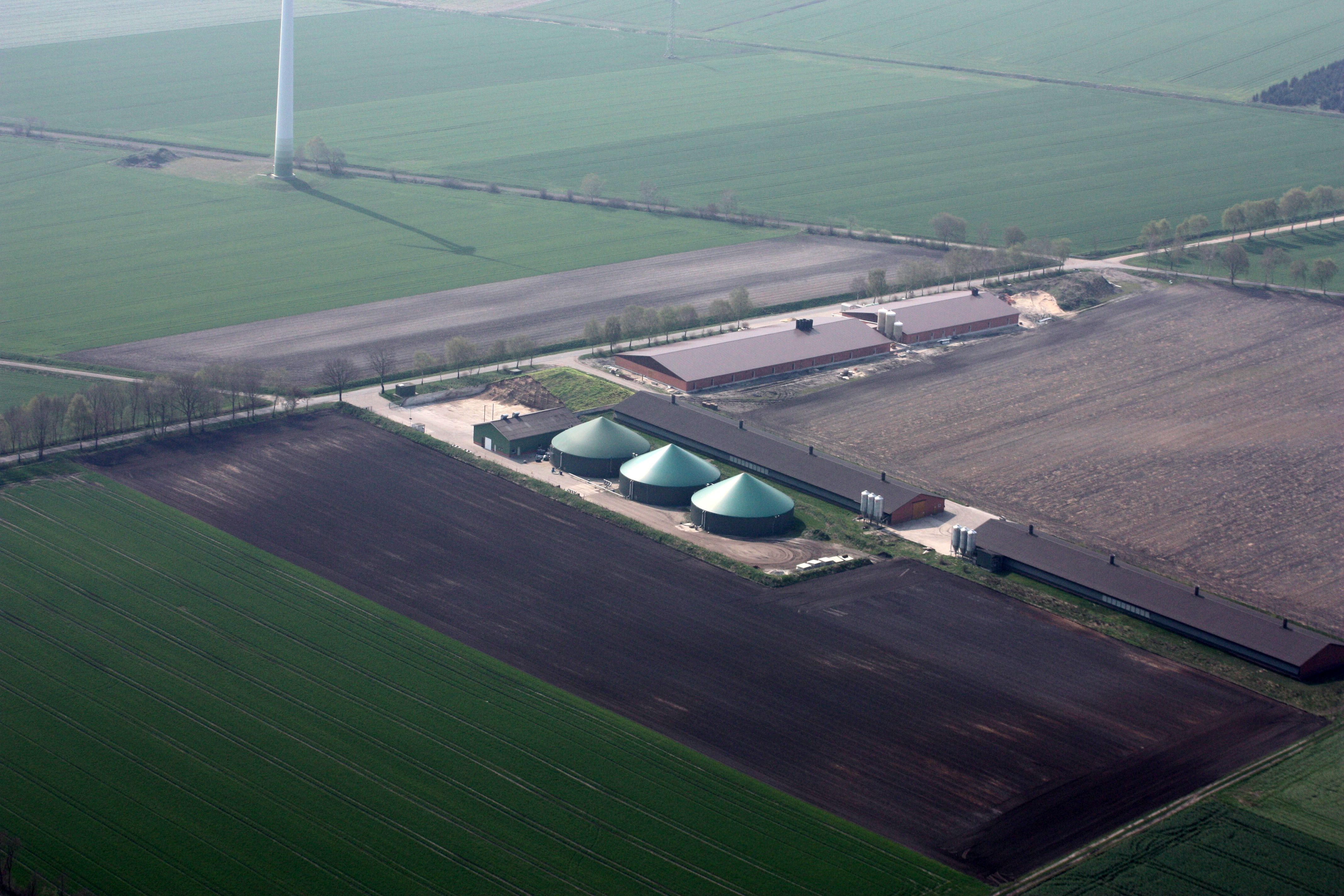 Luftaufnahme Biogasanlage, Nähe Ahlhorner Dreieck